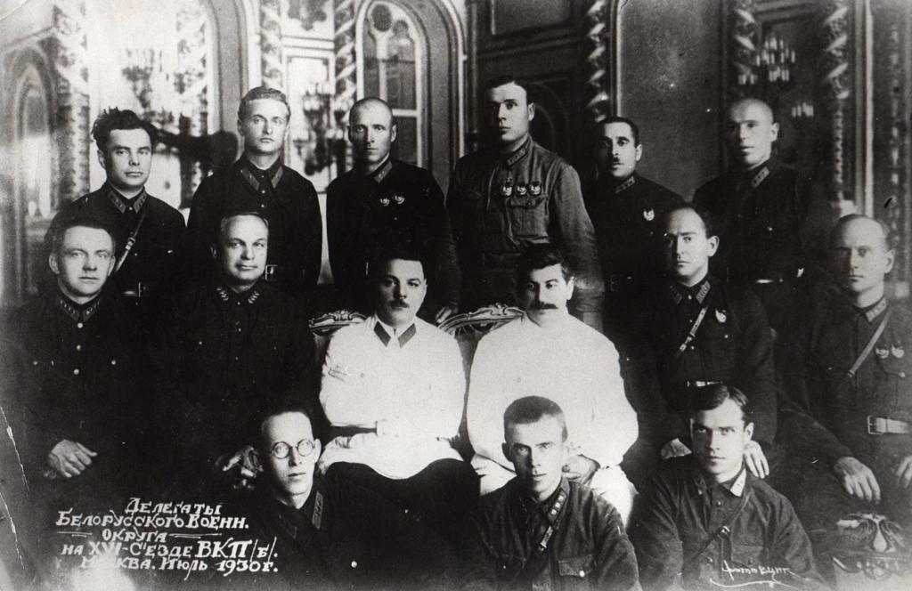 Марк Вайнер. Делегаты Белорусского военного округа на 16-м съезде ВКП(б) в Москве. Июль 1930 г.